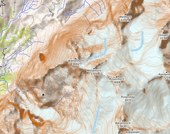 carte réalise sur umap This map may be incomplete, and may contain errors. Don't rely solely on it for navigation.